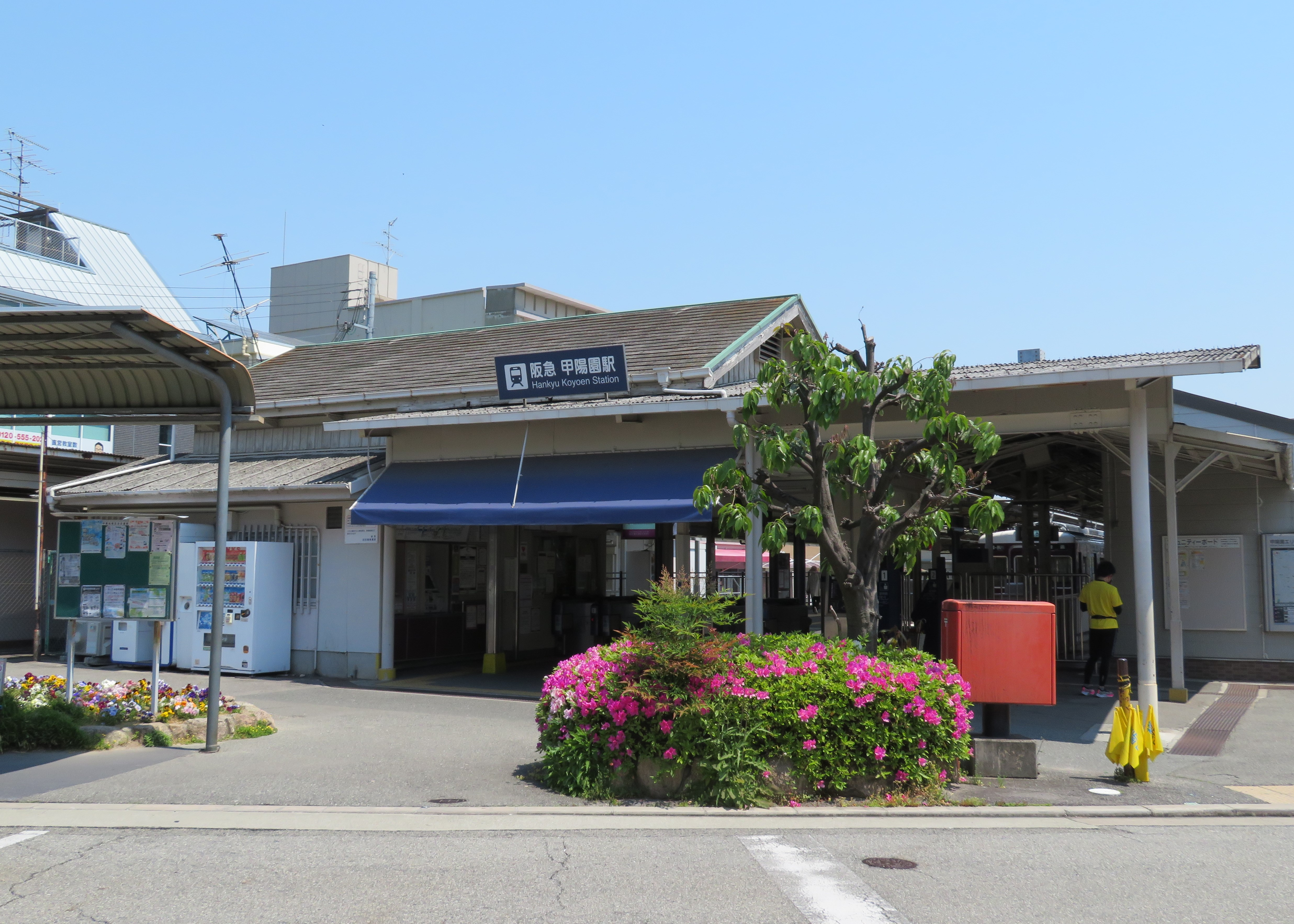 阪急電鉄甲陽園駅